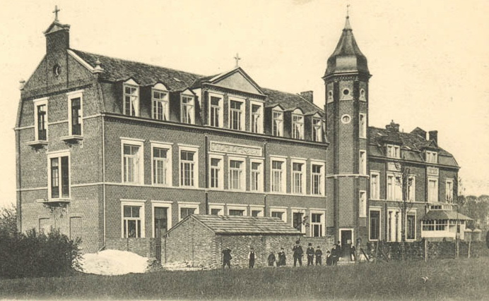 Maastricht-Nazareth, Kasteel Kessenichstraat 2: klooster "Nazareth" / villa "Bel Aire". Van 1904 tot 1981 was hier het klooster van de van oorsprong Franse zusters Ursulinen van Jezus (Ursulines de Jésus dites de Chavagnes). De zusters hadden er een bewaarschool, meisjesschool, internaat voor onder andere schipperskinderen, en hielden zich bezig met bejaardenzorg. Prentbriefkaart in collectie RHCL Maastricht, ref. nr. GAM 7385.